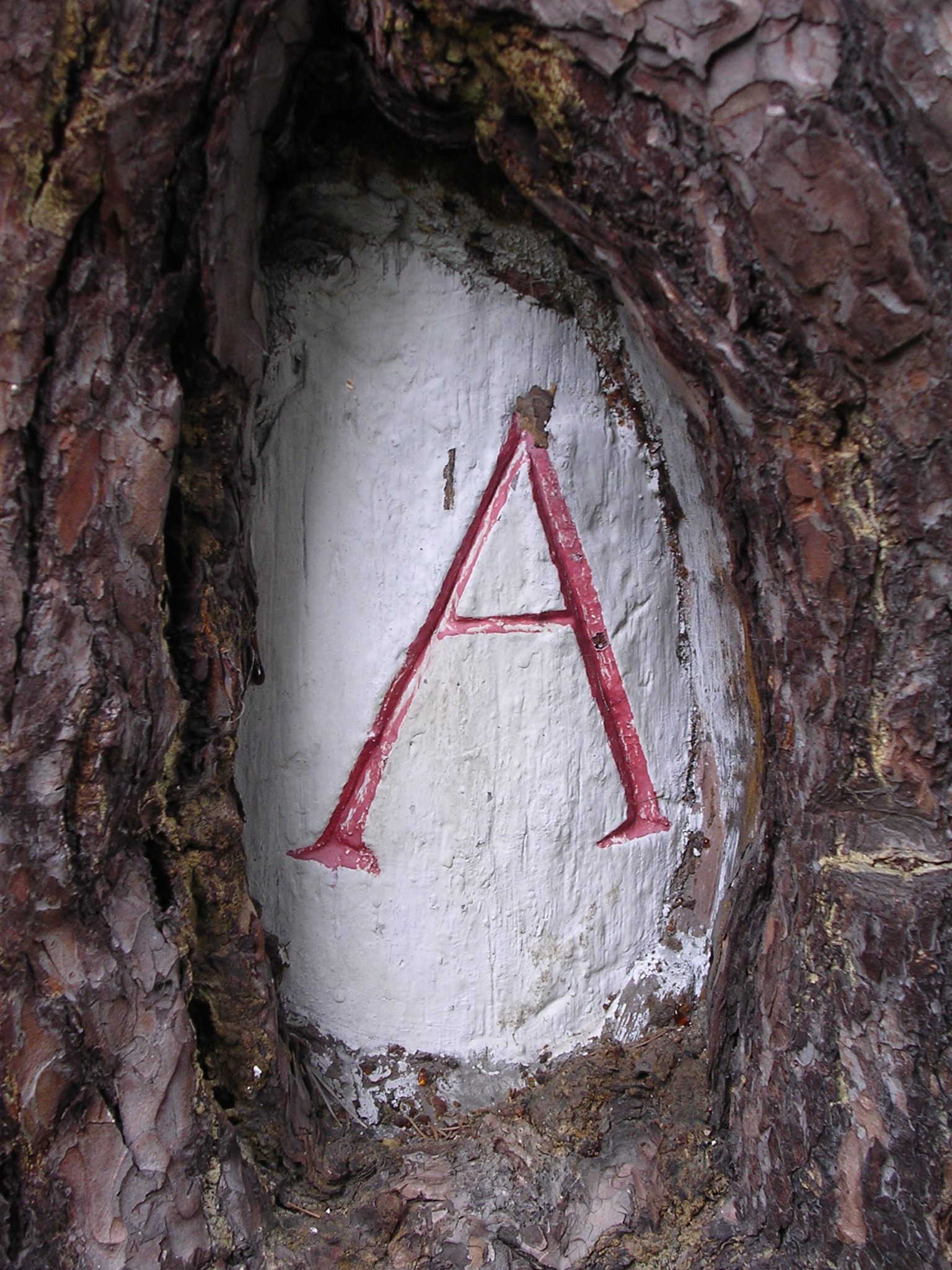 Geschnitztes historisches Wegzeichen (A-Flügel) in der Dresdner Heide